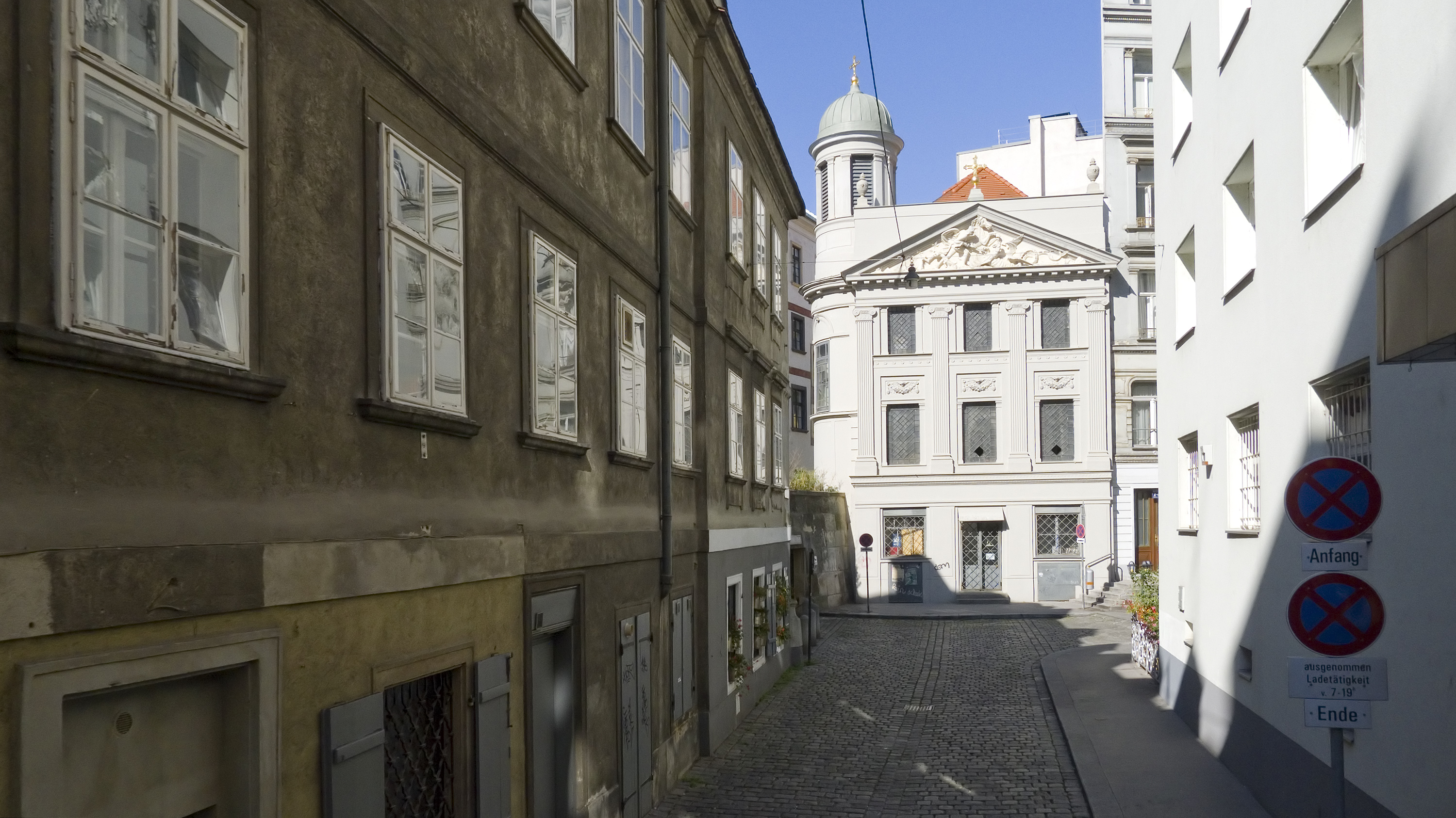 Hafnersteig in Wien 1 bei Nr. 7 Richtung Westen